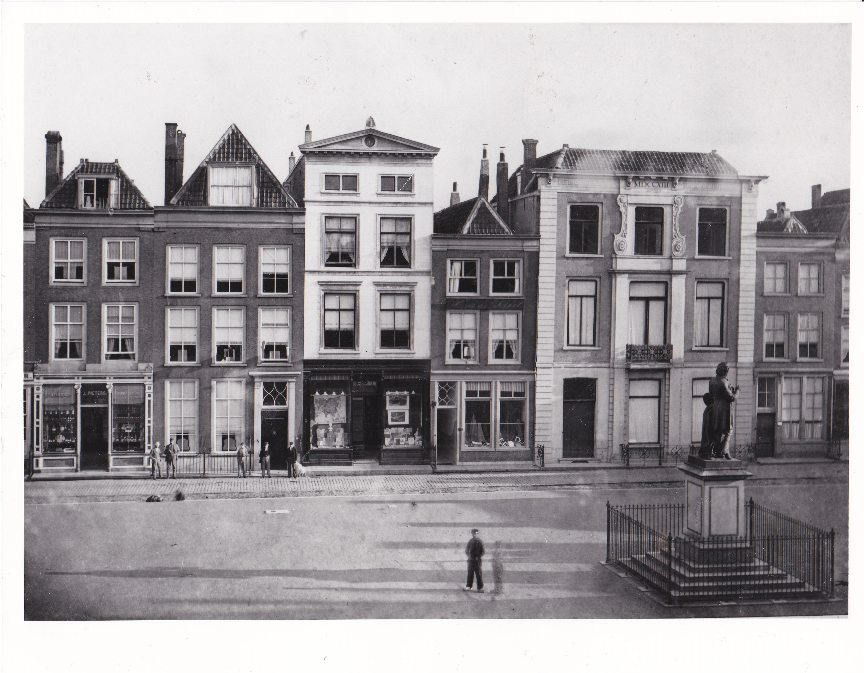 Dordrecht: deze foto uit 1877 toont het Scheffersplein en de Voorstraat; in het midden de boekhandel Blussé & Van Braam.